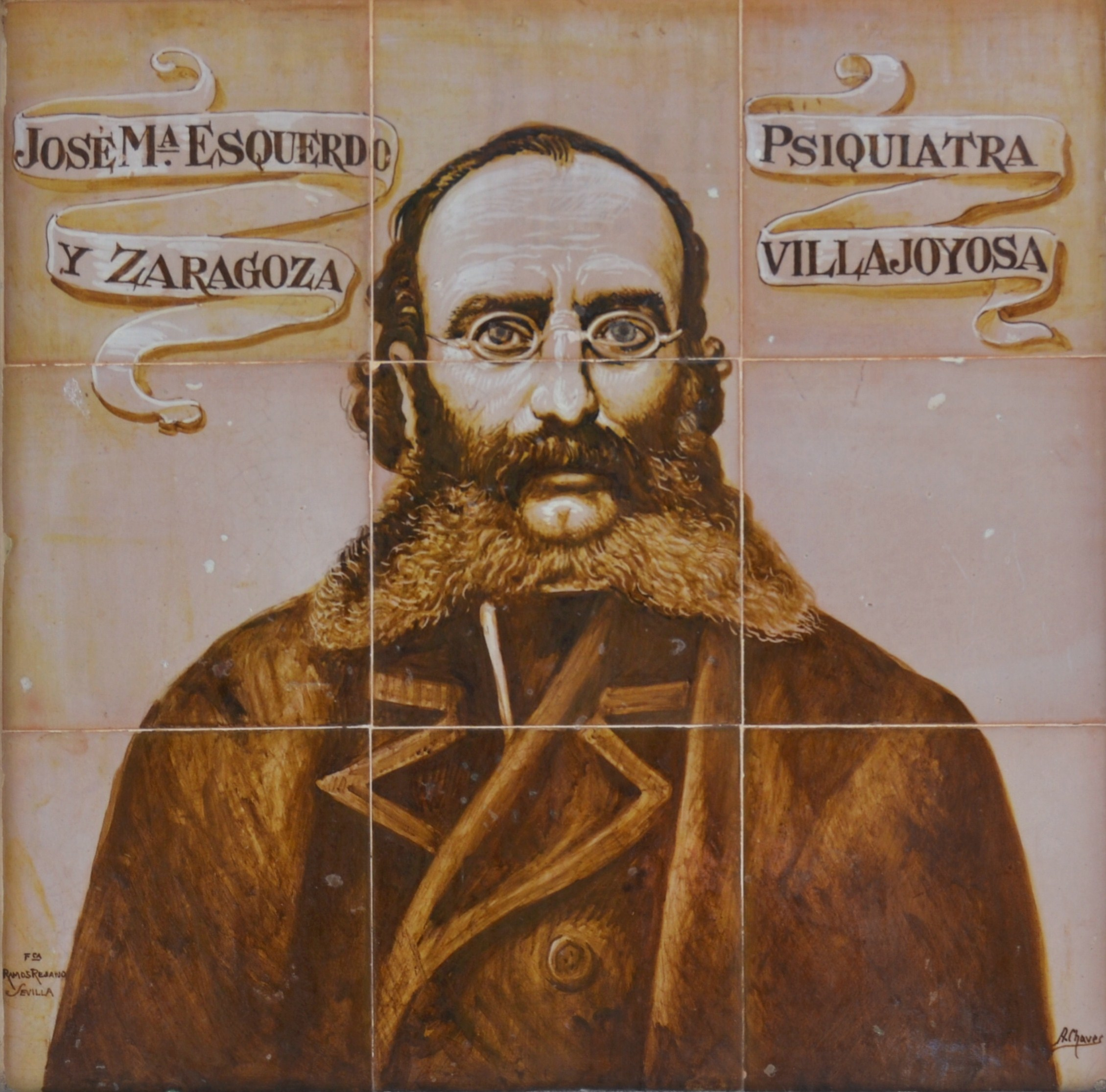 Josep Maria Esquerdo i Zaragoza, plafó ceràmic a Alacant.